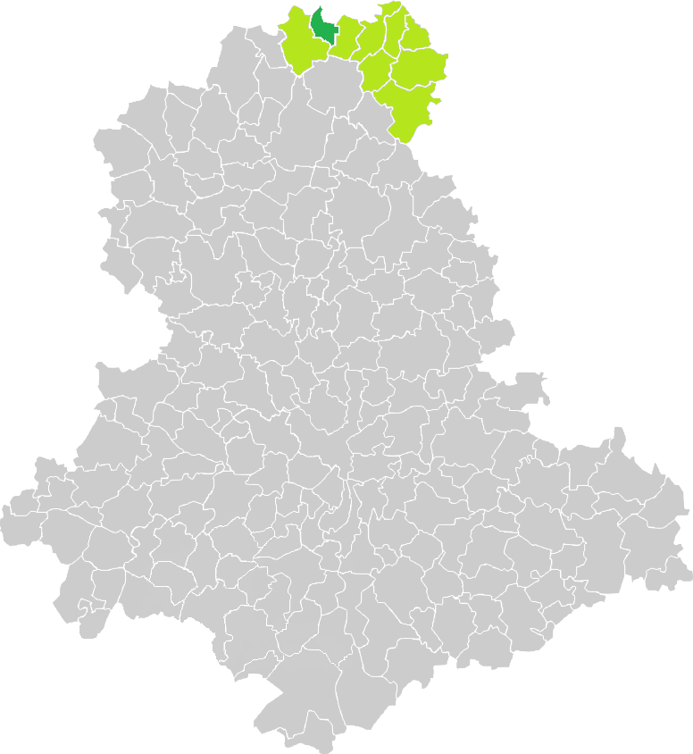 Carte de situation de la commune de Saint-Martin-le-Mault (en vert foncé) dans le votre Canton (en vert clair) sur une carte des communes de la Haute-Vienne